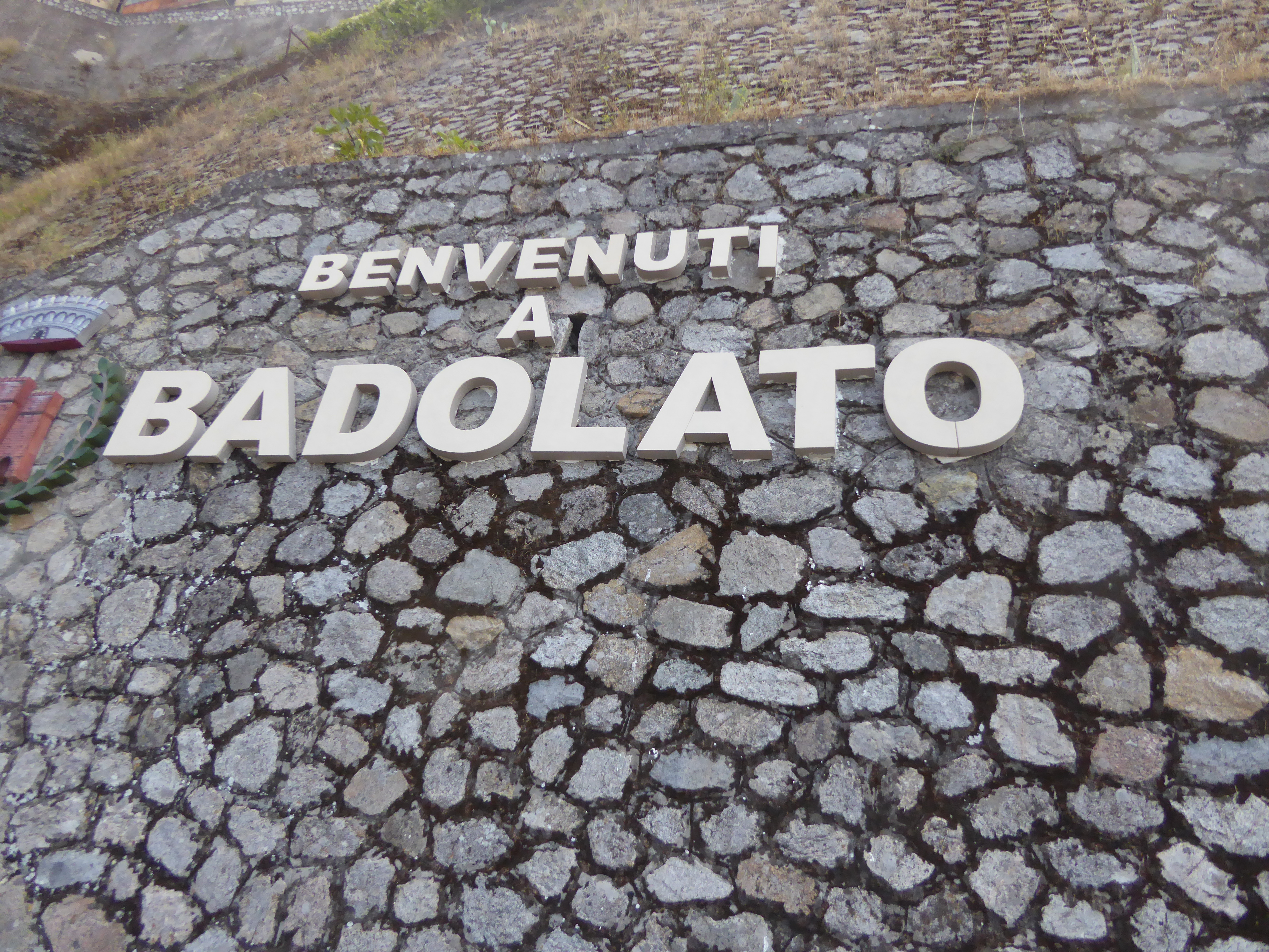 Benvenuti a Badolato (2018)